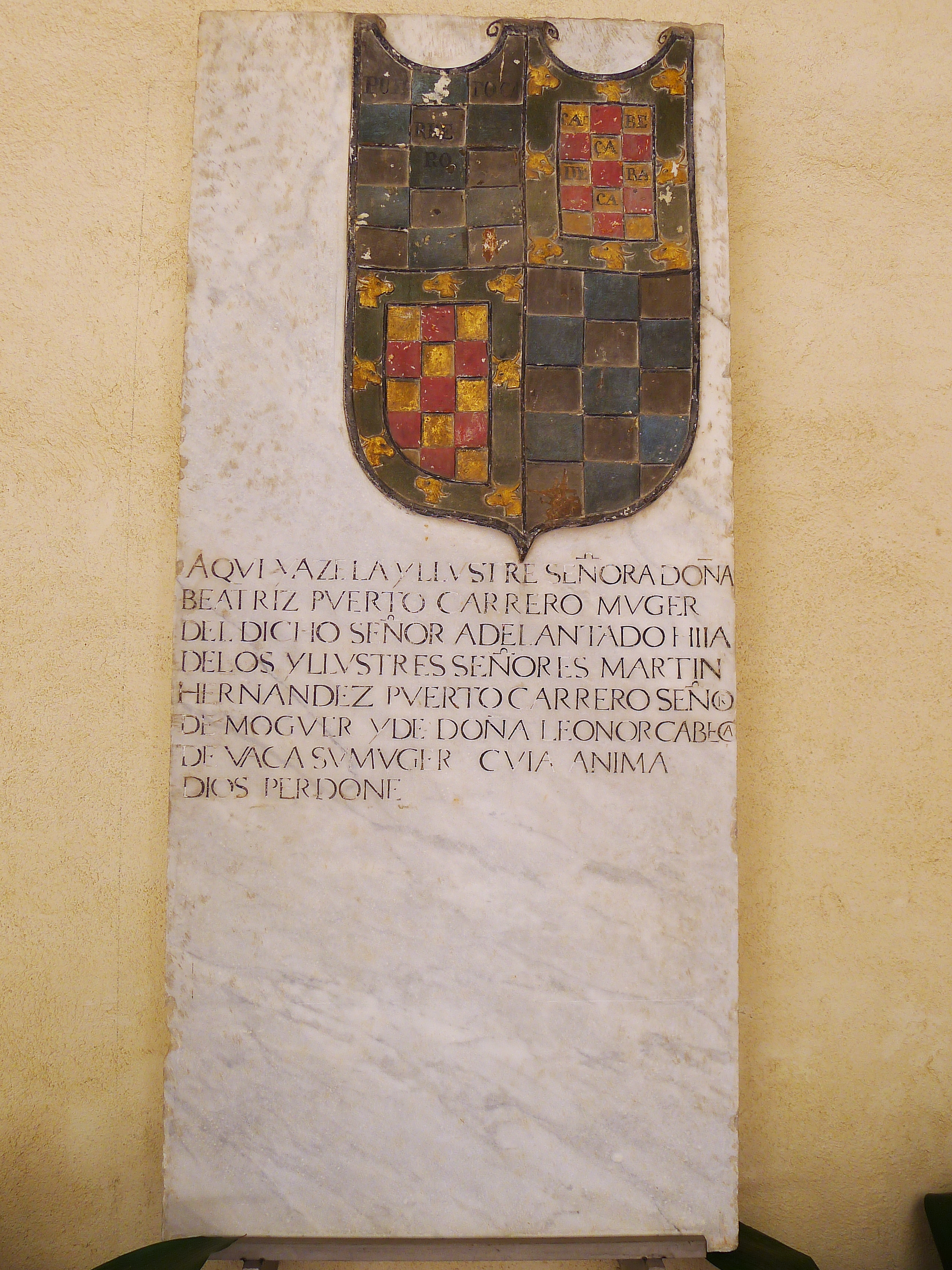 Monasterio de la Cartuja de Santa María de las Cuevas. Beatriz Portocarrero (†1458), hija de Martín Fernández Portocarrero, IV Señor de Moguer, y de Leonor Cabeza de Vaca. Mujer de Diego Gómez de Ribera